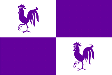 Bandera de la Parroquia de Breceña